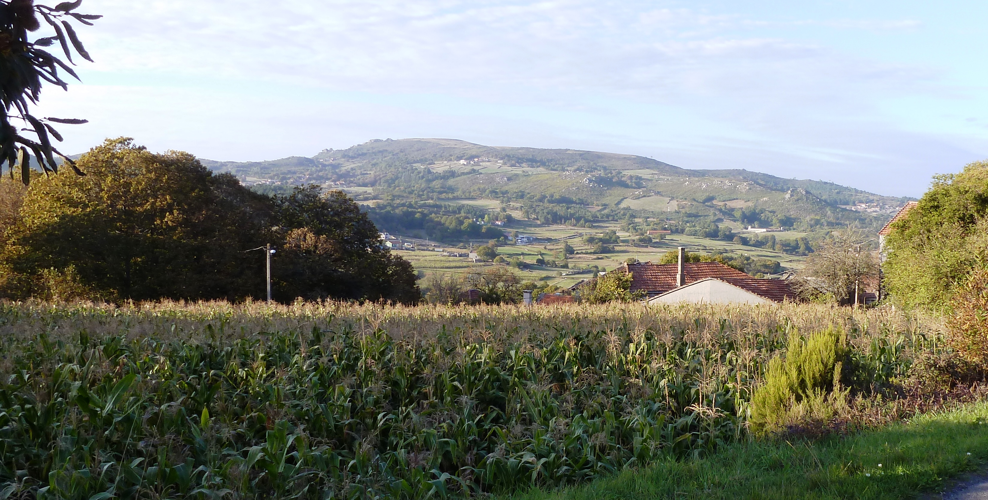 Eido de millo en Agrexán, Aguada, Carballedo